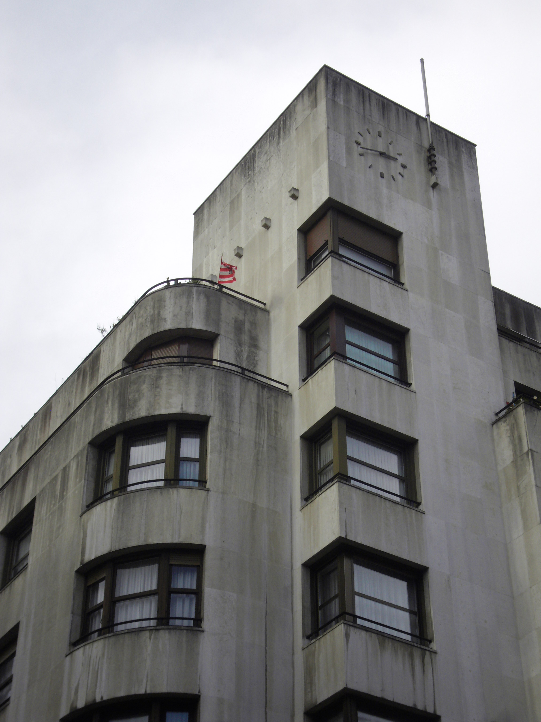 Equitativa eraikinaren bi fatxadak (Mazarredo eta Colon de Larreategi) 1930eko hamarkadako estilo arrazionalistakoak, Bilbo